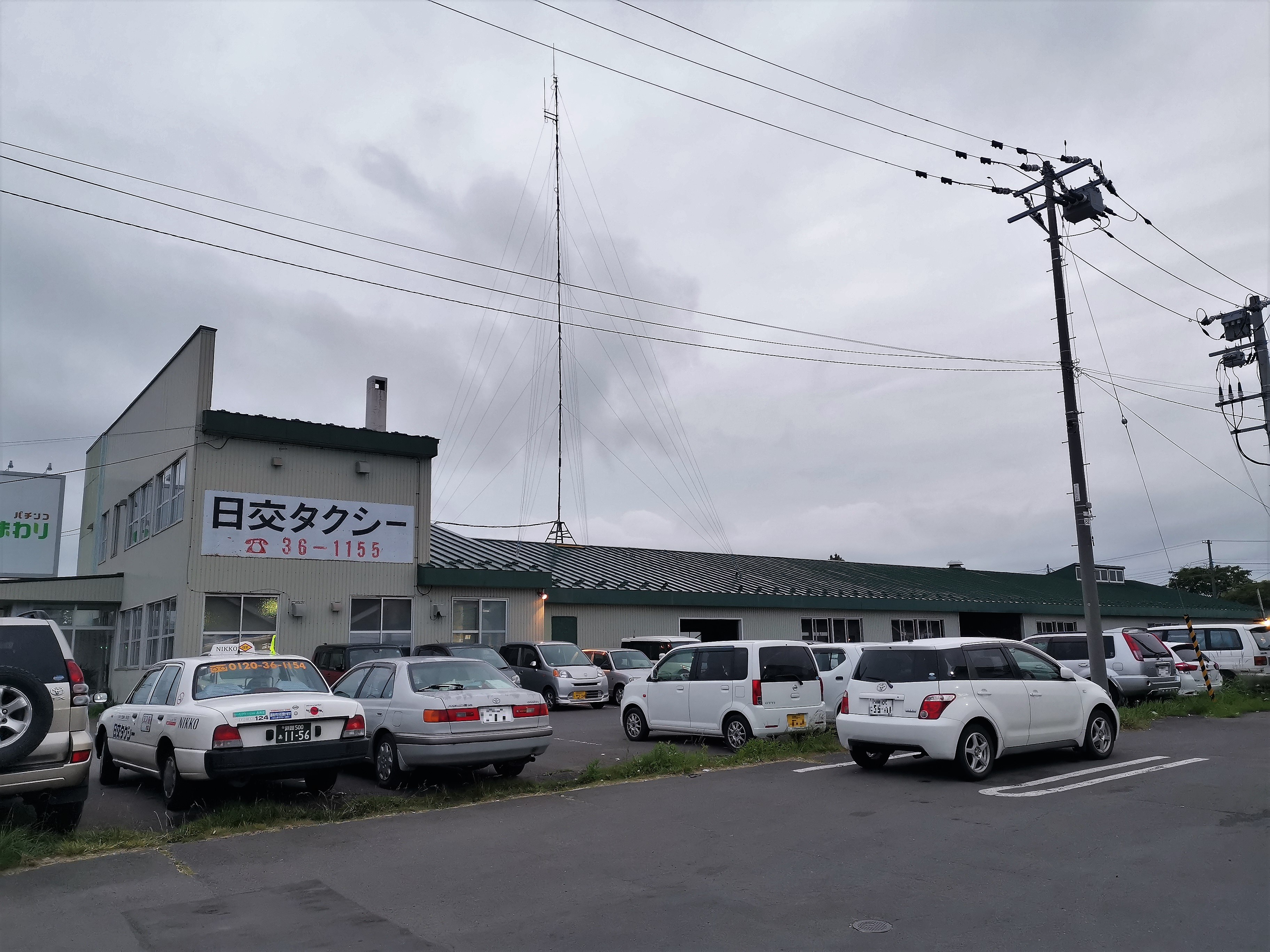 本社社屋兼整備工場、左手前にタクシー車両。